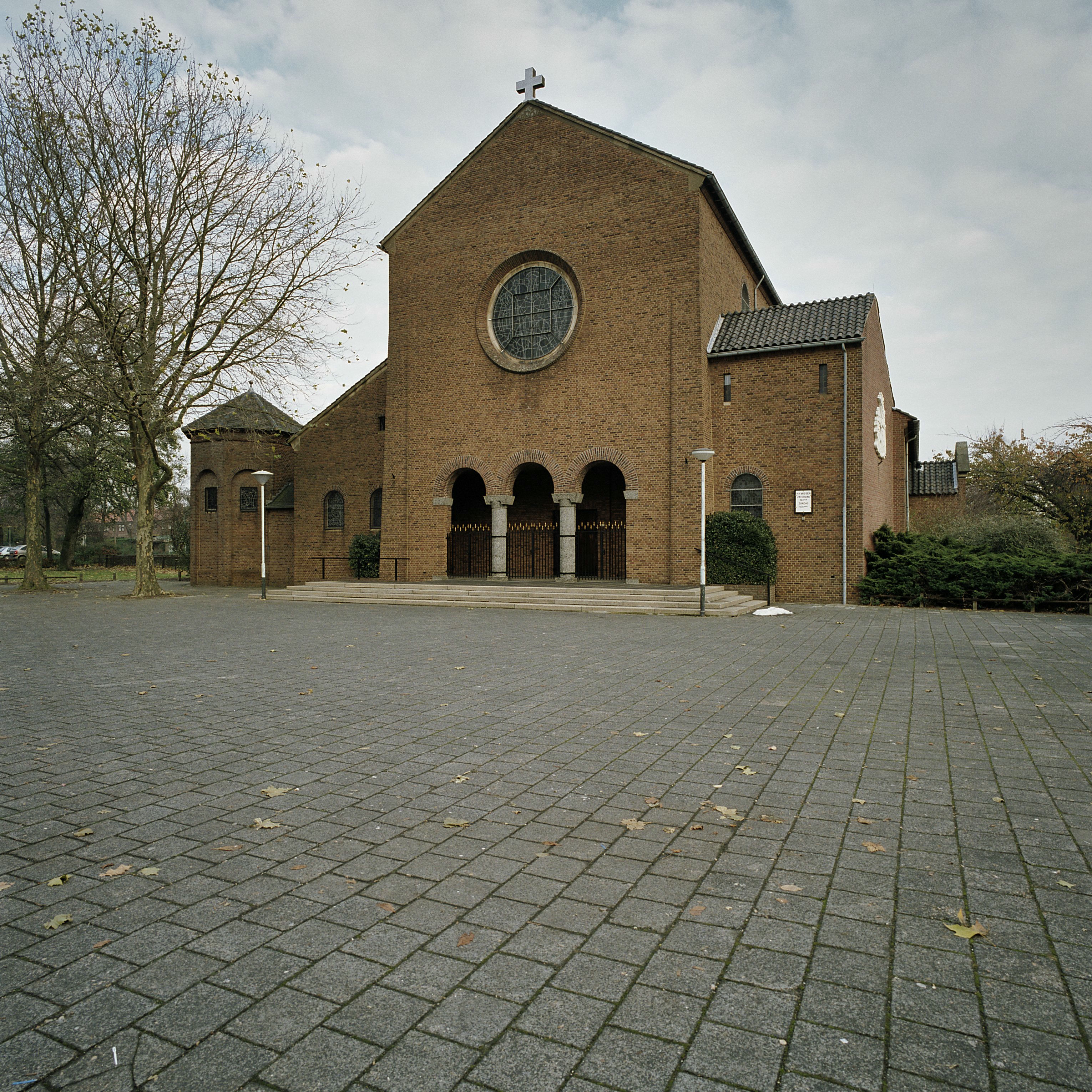 Woonwijk Hazenkamp: Overzicht westgevel van de Parochiekerk (opmerking: Wederopbouwproject) - Blerick, St Hubertusplein 1 - Hubertuskerk